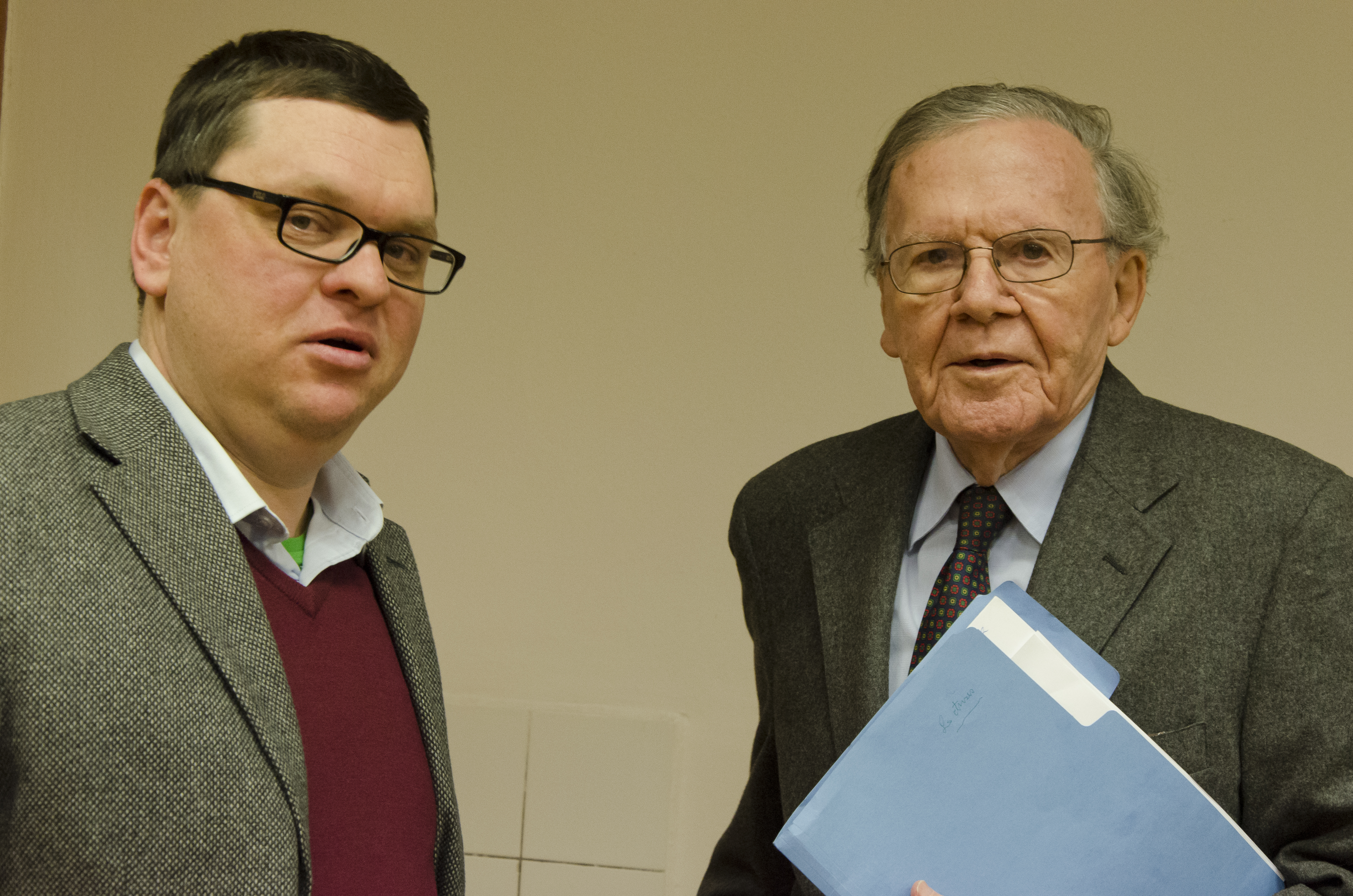 Petr Hlaváček a americký germanista Peter Demetz (2012)